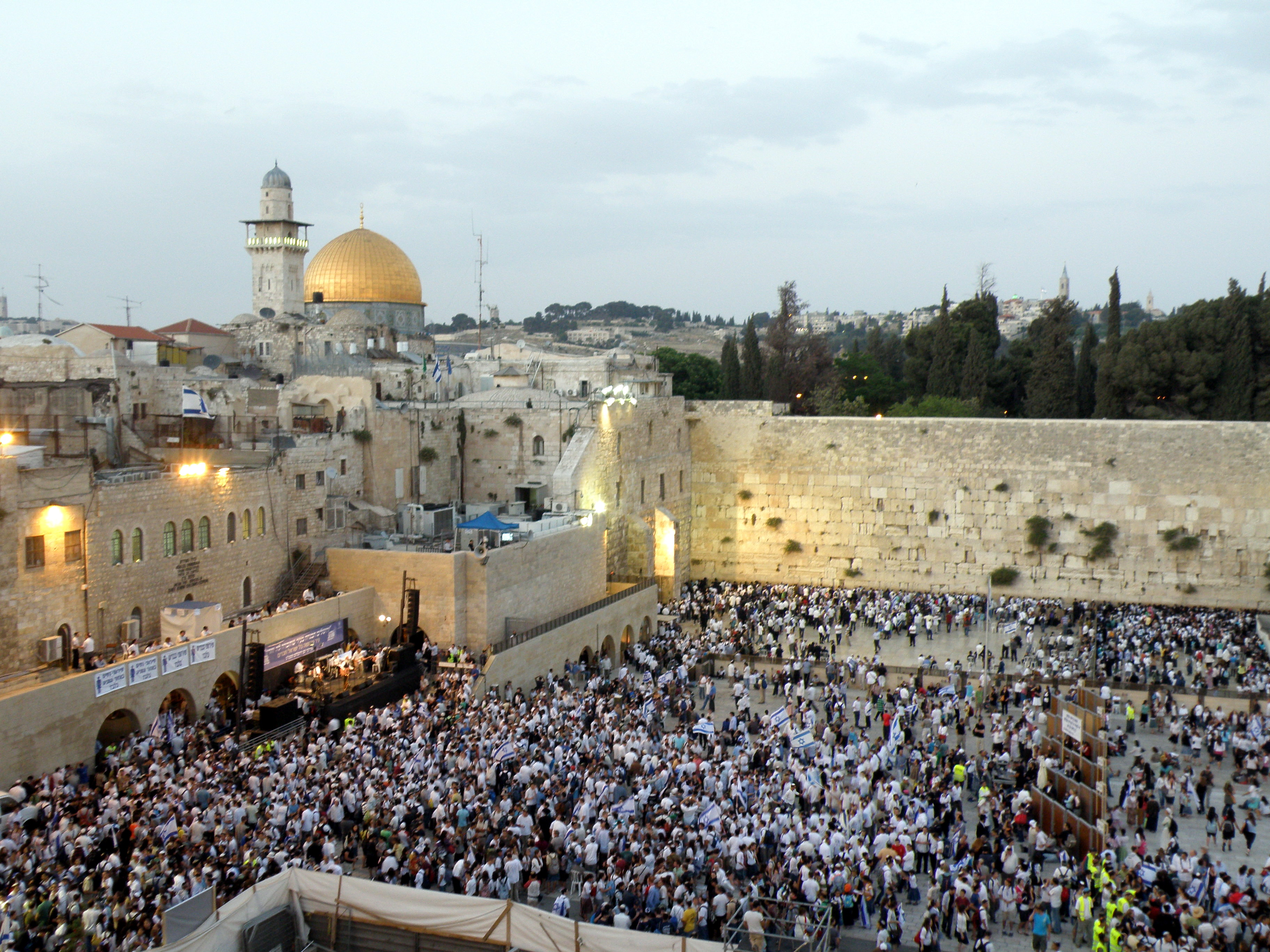 ריקודגלים | יום ירושלים Jerusalem